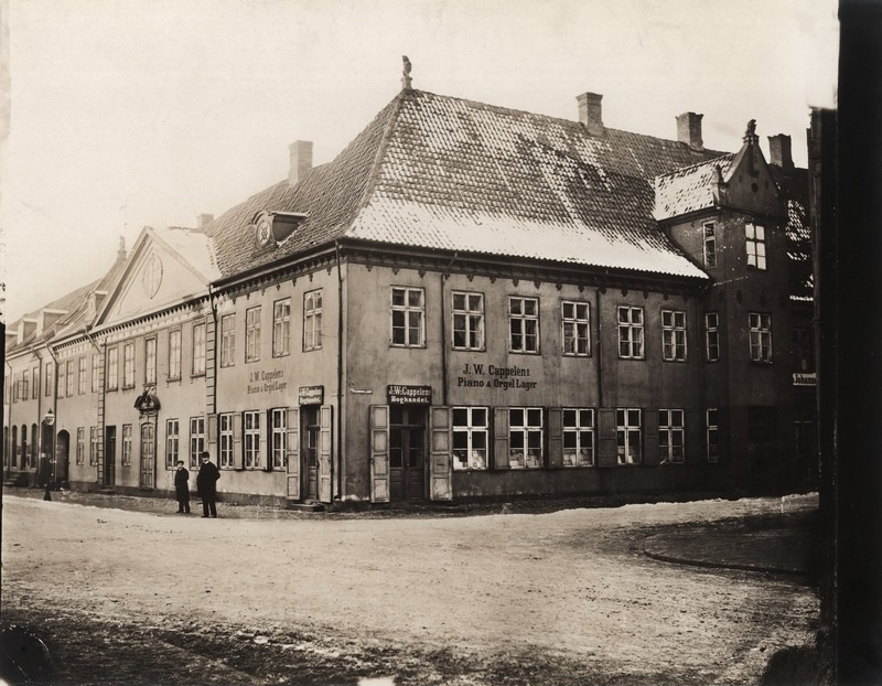 Collettgården